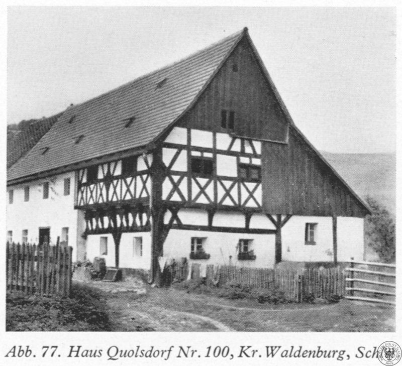 Dom przyslupowy w Chwaliszowie